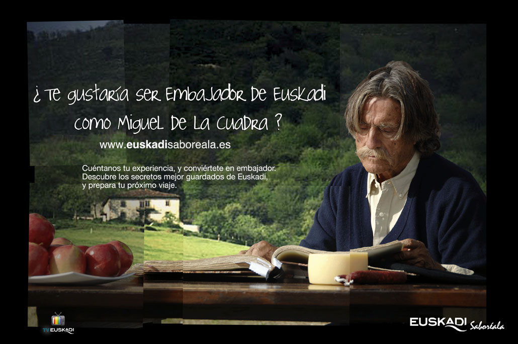 Martín Berasategui, Modesto Lomba, Edurne Pasaban y Miguel de la Quadra-Salcedo se convierten en 'Embajadores de Euskadi'